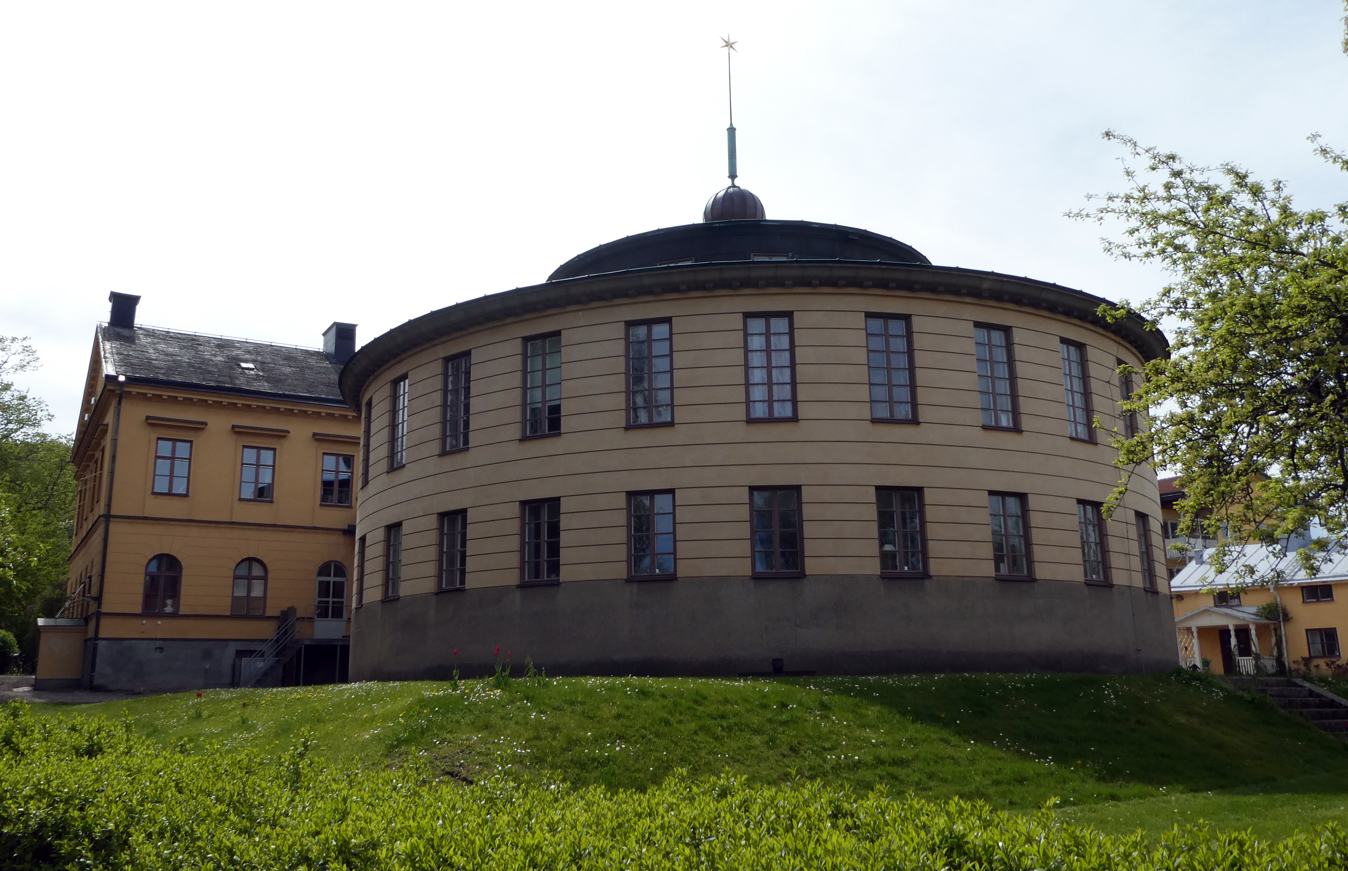 Biblioteksrotundan på baksidan av Konsistoriehuset i Linköping